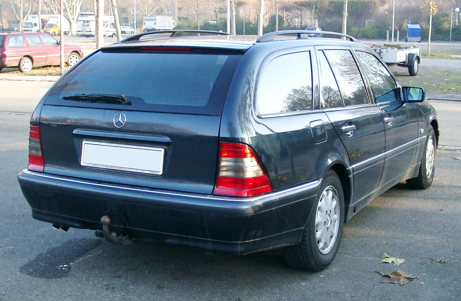 Mercedes-Benz S202 (T-Modell)